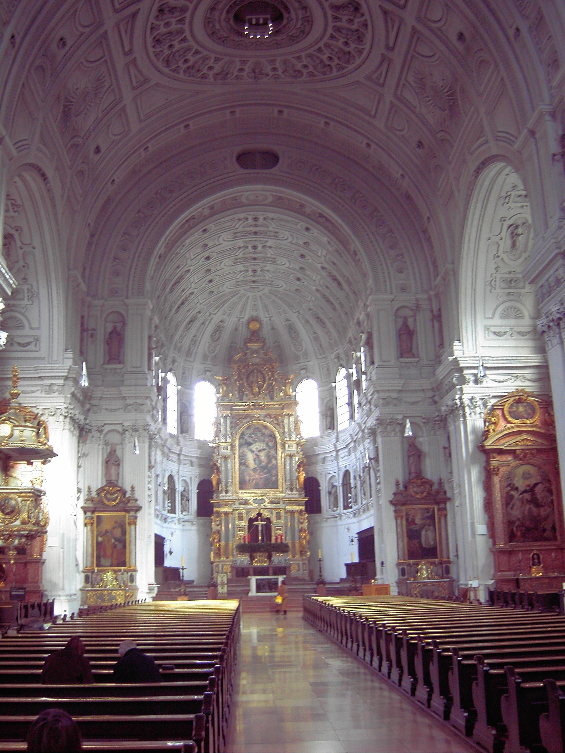 Bilder aus dem vorweihnachtlichen Weihnachten